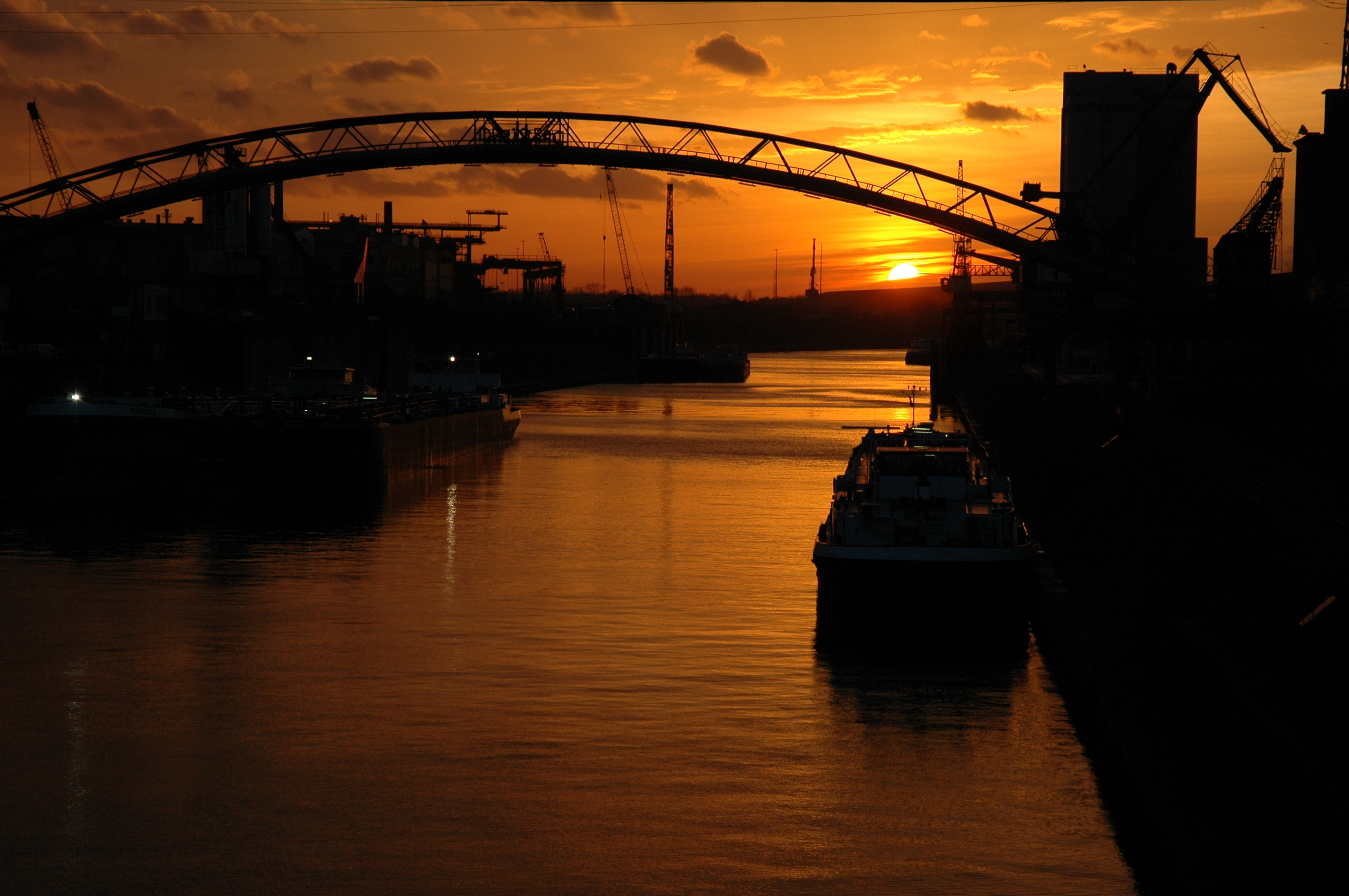 Duisburger Hafen am Abend / Duisburg Harbour in the evening